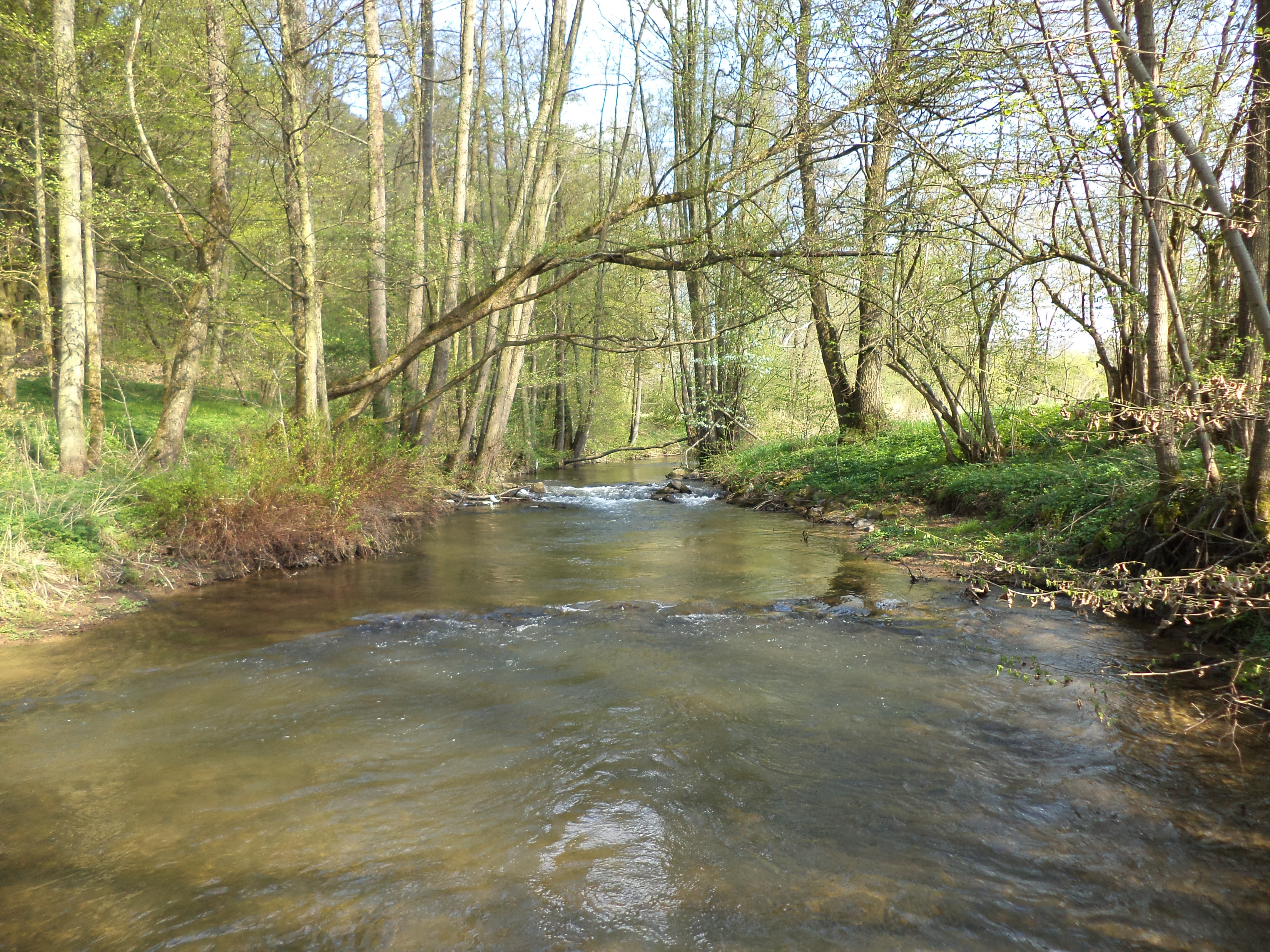 Die Elsava westlich von Eschau